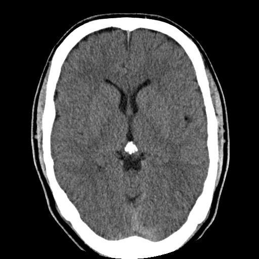 Verkalkter Tumor im Corpus pineale